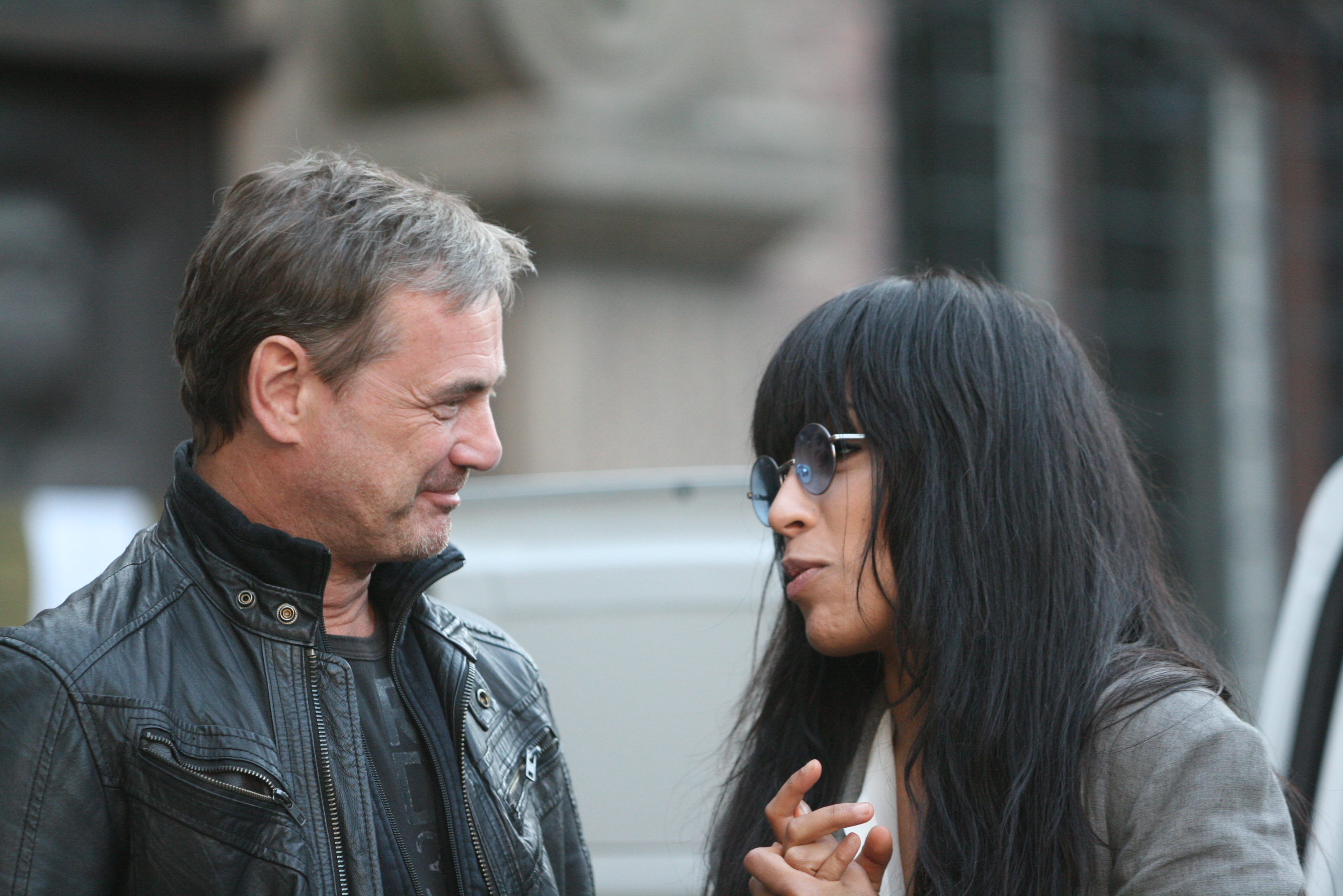 Christer Björkman and Loreen at Sommartorsdagarna, June 2012 in Borås, Sweden.